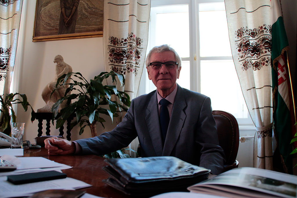 Almási István (Elek, 1944. július 12. – Hódmezővásárhely, 2017. november 20.) politikus, Hódmezővásárhely polgármestere volt.